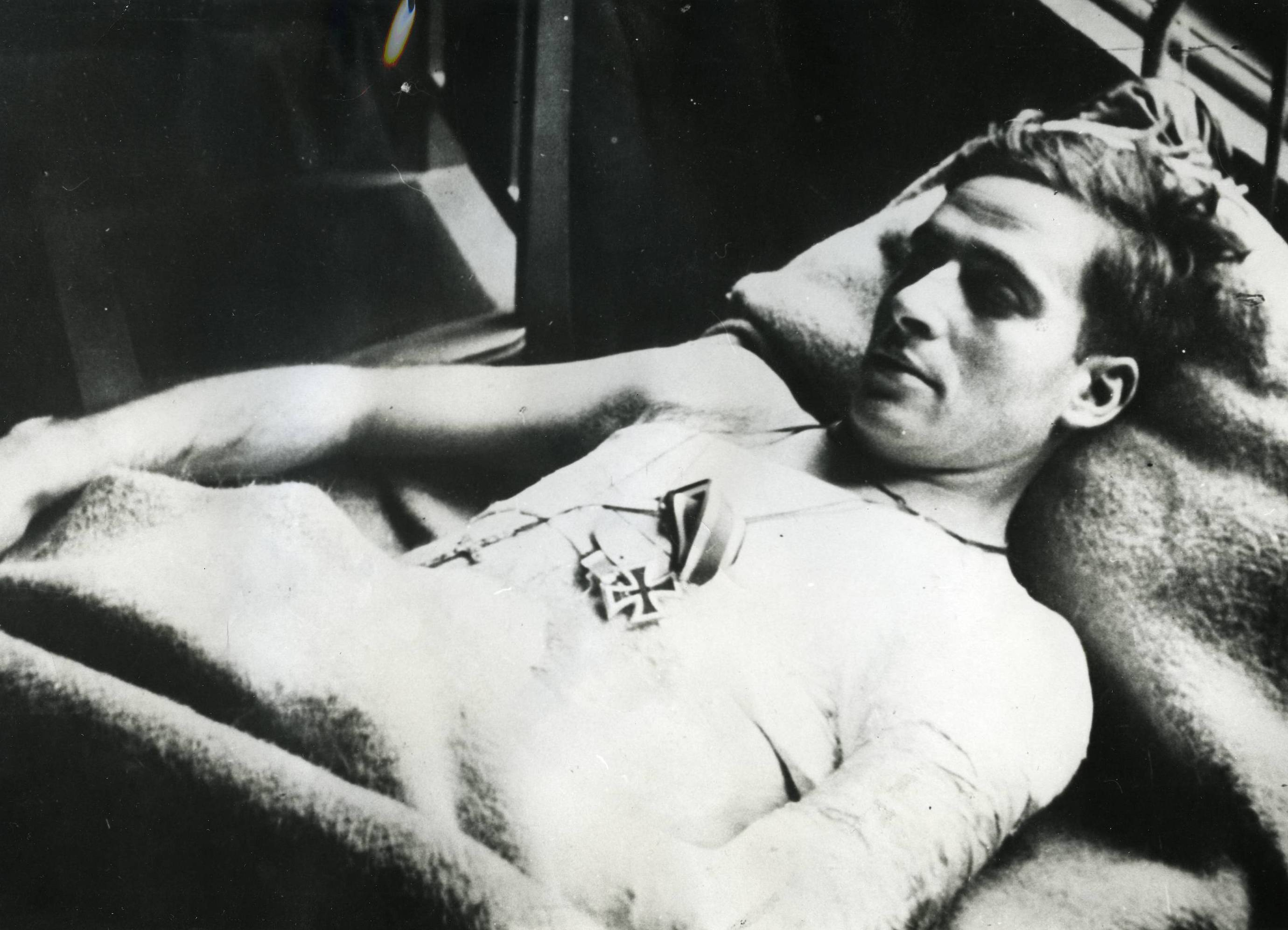 José Escobedo y Ruiz en el hospital, con la cruz de hierro de segunda clase en el pecho.